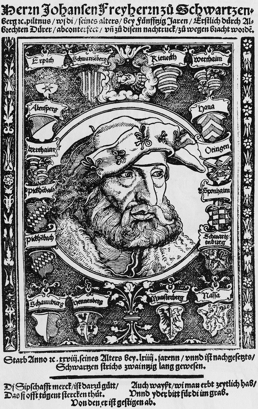 Holzschnitt, Albrecht Dürer fec.. Johann von Schwarzenberg (geb. 24. December 1463, gest. 21. October 1528). Mit Text von Schwarzenberg (laut Wurzbach): Die Sippschaft, merk’, ist dazu gut, Daß sie oft Tugend stärken thut. Auch weiset, wie man Erbe zeitlich hab’; Und Jeder bet’ für die im Grab’, Von denen er ist gestiegen ab.